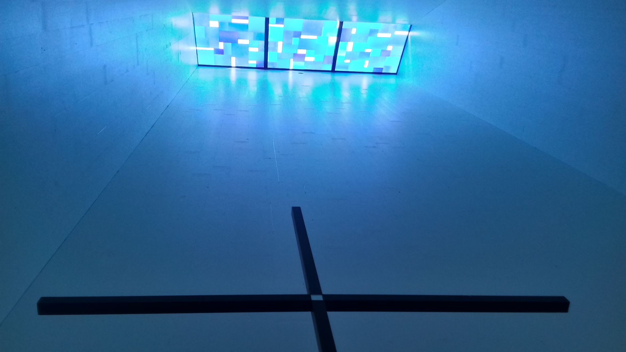 Kreuz und Glasdach in der Kapelle Emersacker